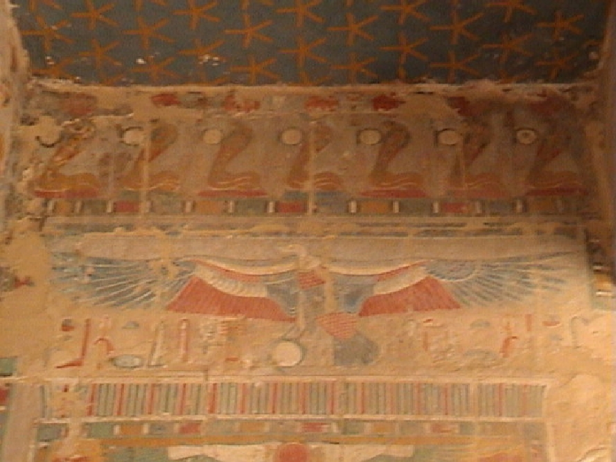 Relief peint représentant la déesse Nekhbet - Temple d'Hatchepsout à Deir el-Bahari - XVIIIe dynastie égyptienne